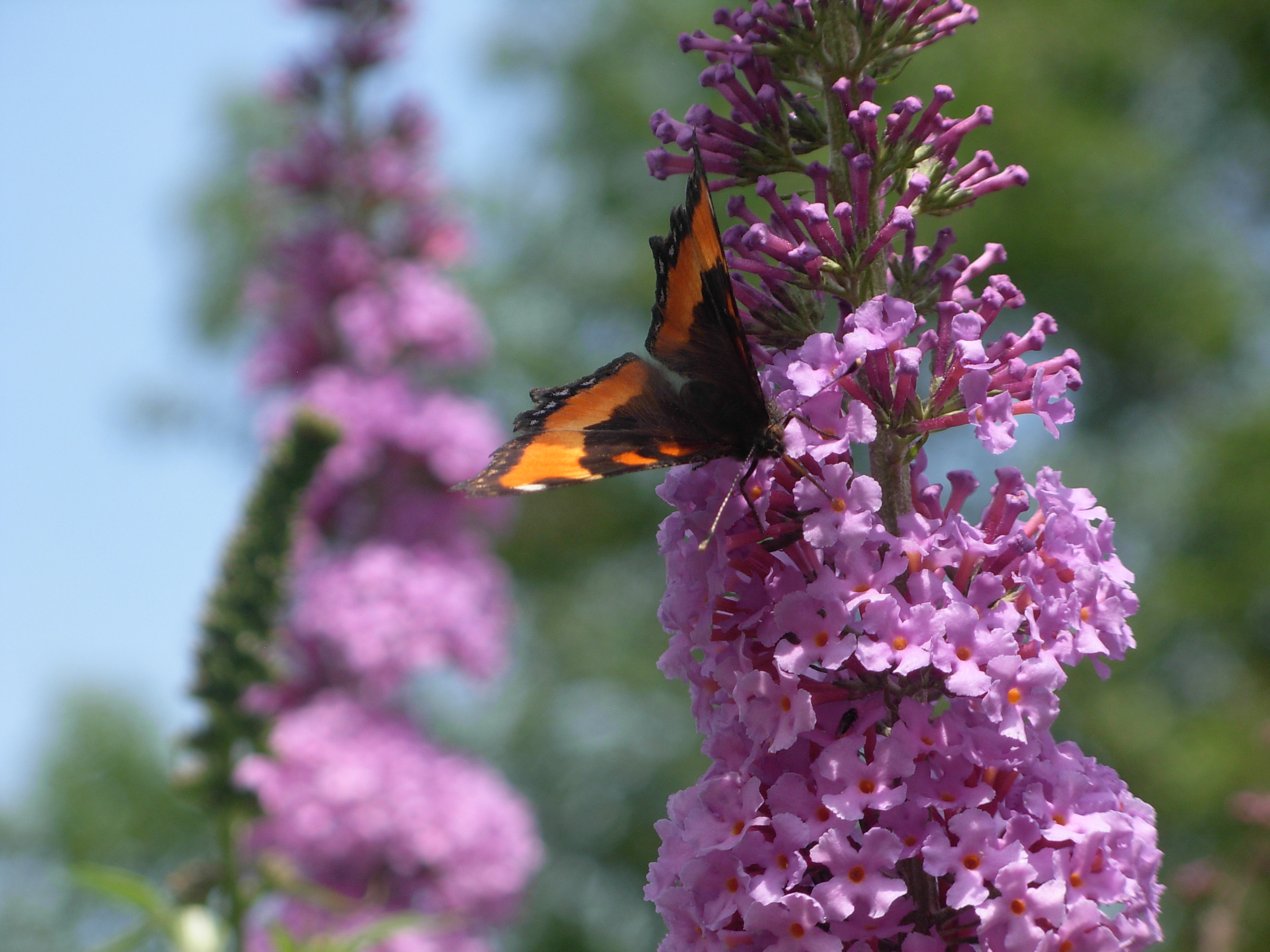 Aglais urticae (Linnaeus, 1758) on Buddleja davidii